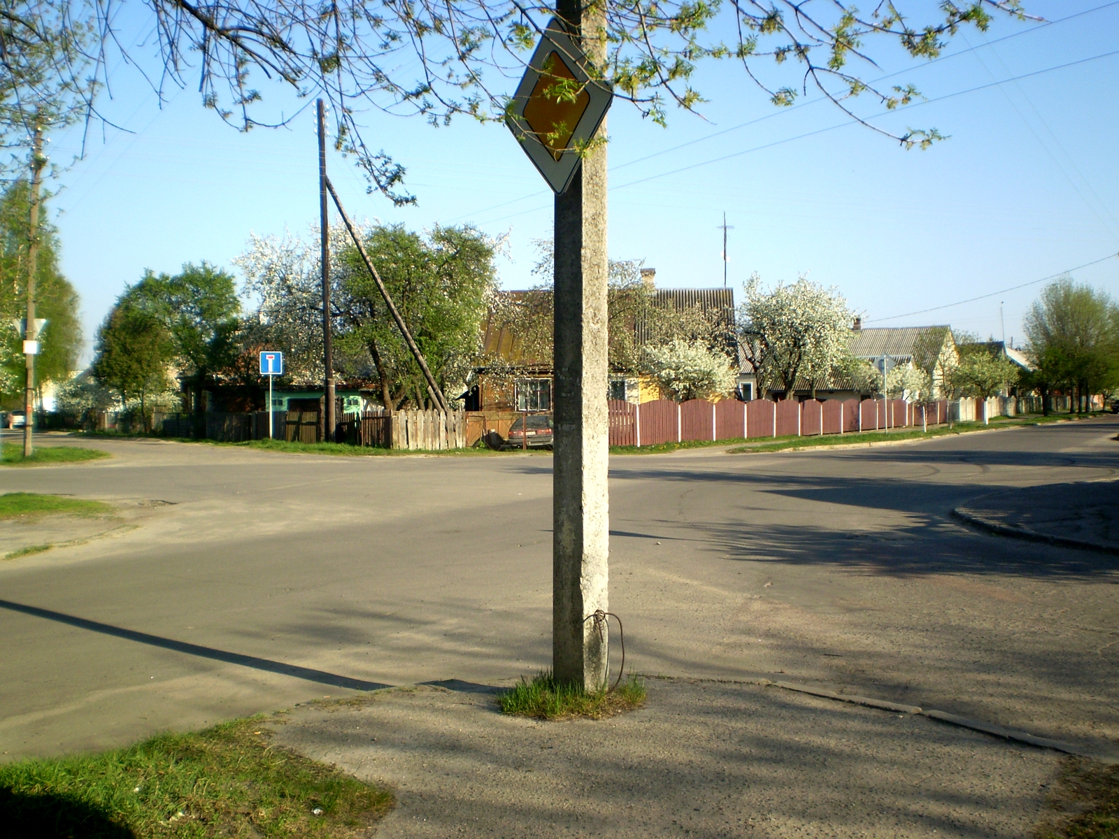 Скрыжаванне вул. Баброва, Паўночнай, Чырвонай і зав. 1-ым Паўночным